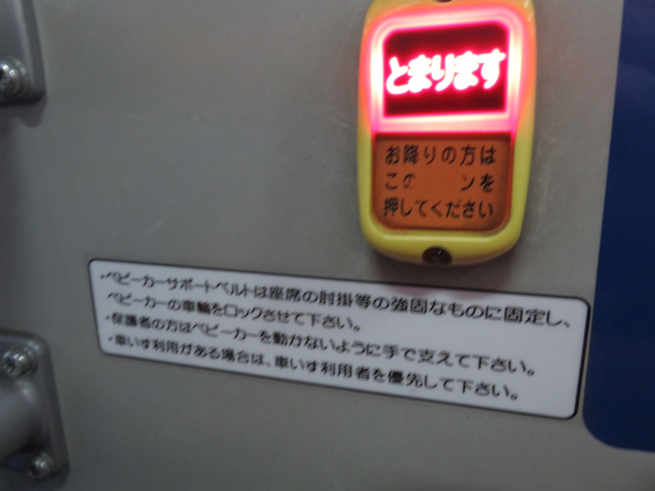 車椅子固定座席横のベビーカー用の説明。 宇都宮200か・821 車内